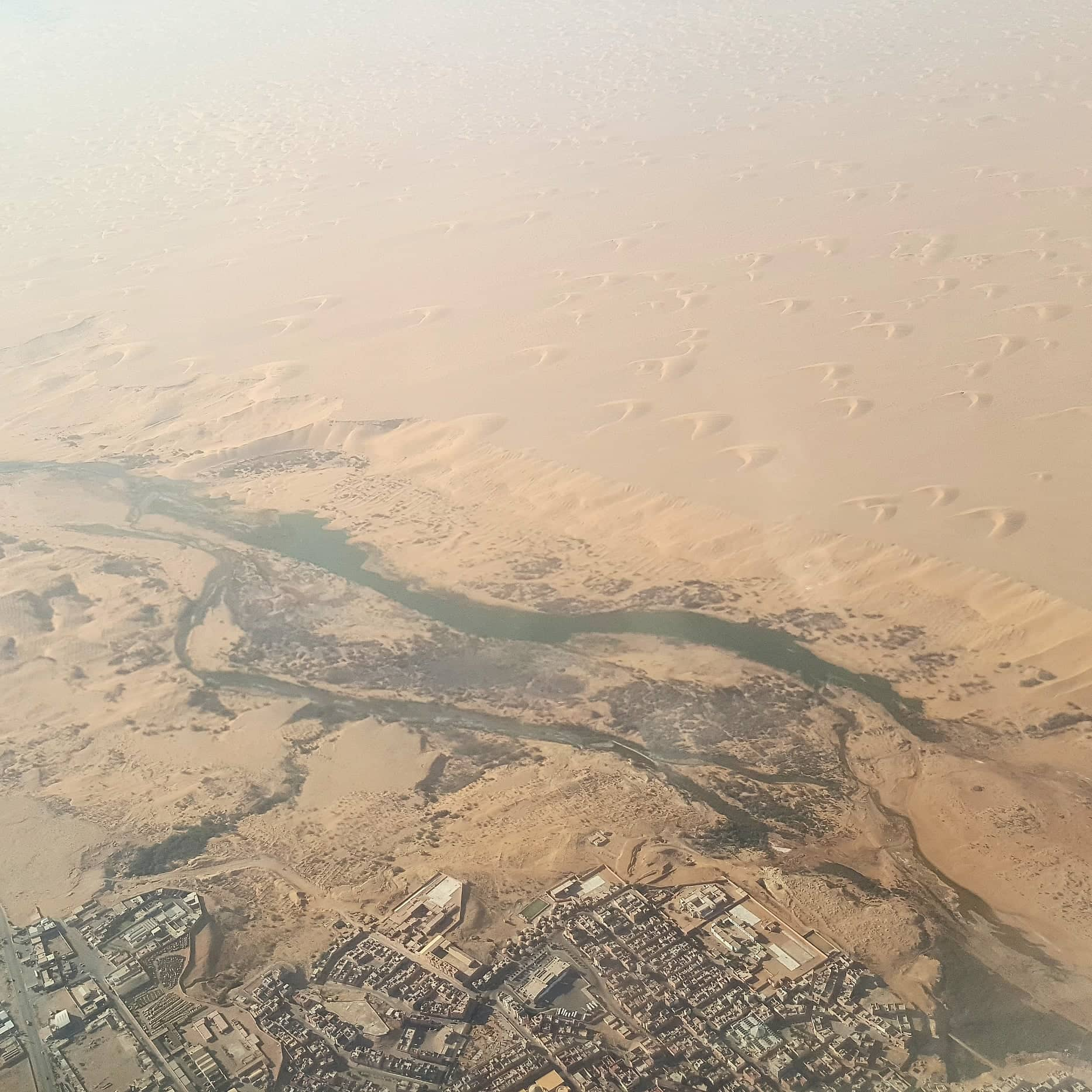 صورة جوية لوادي الساقية الحمراء و على ضفته جزء من مدينة العيون